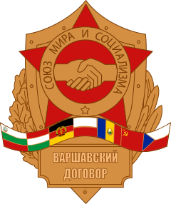 Pilsen